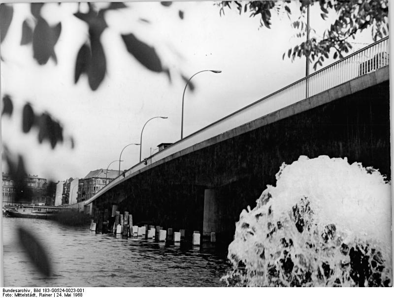 Berlin, Treptow, Elsenbrücke, Eisenbahnbrücke Zentralbild Mittelstädt ch-gü 24.5.1968 Berlin: Ihrer Vollendung geht die neue Elsenbrücke in Treptow entgegen, die mit einer Länge von 168 m und einer Breite von 34 m die Spree überspannt und den Markgrafendamm mit der Elsenstraße verbindet. Im zweiten Halbjahr 1968 wird über diese neue Brücke der Verkehr zügiger als über die bisherige Behelfsbrücke rollen.